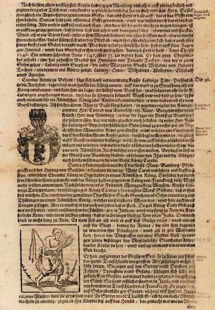 Wappen derer von Bärenfels zu Basel in Sebastian Münsters (1488-1552) «Cosmographia», deutschsprachige Ausgabe 1614, mit Beschreibung zur Geschichte des römisch-deutschen Kaisers Karl IV. (1316 - 1378) und Abriss zu "Herr Conrad von Berenfels" (Konrad von Bärenfels), Ritter und Bürgermeister von Basel, als in Gegenwart Karls IV. in Basel eine Ratsversammlung gehalten wurde. (Darunter abgebildet: ein Geißler mit Geißel und Rute.)